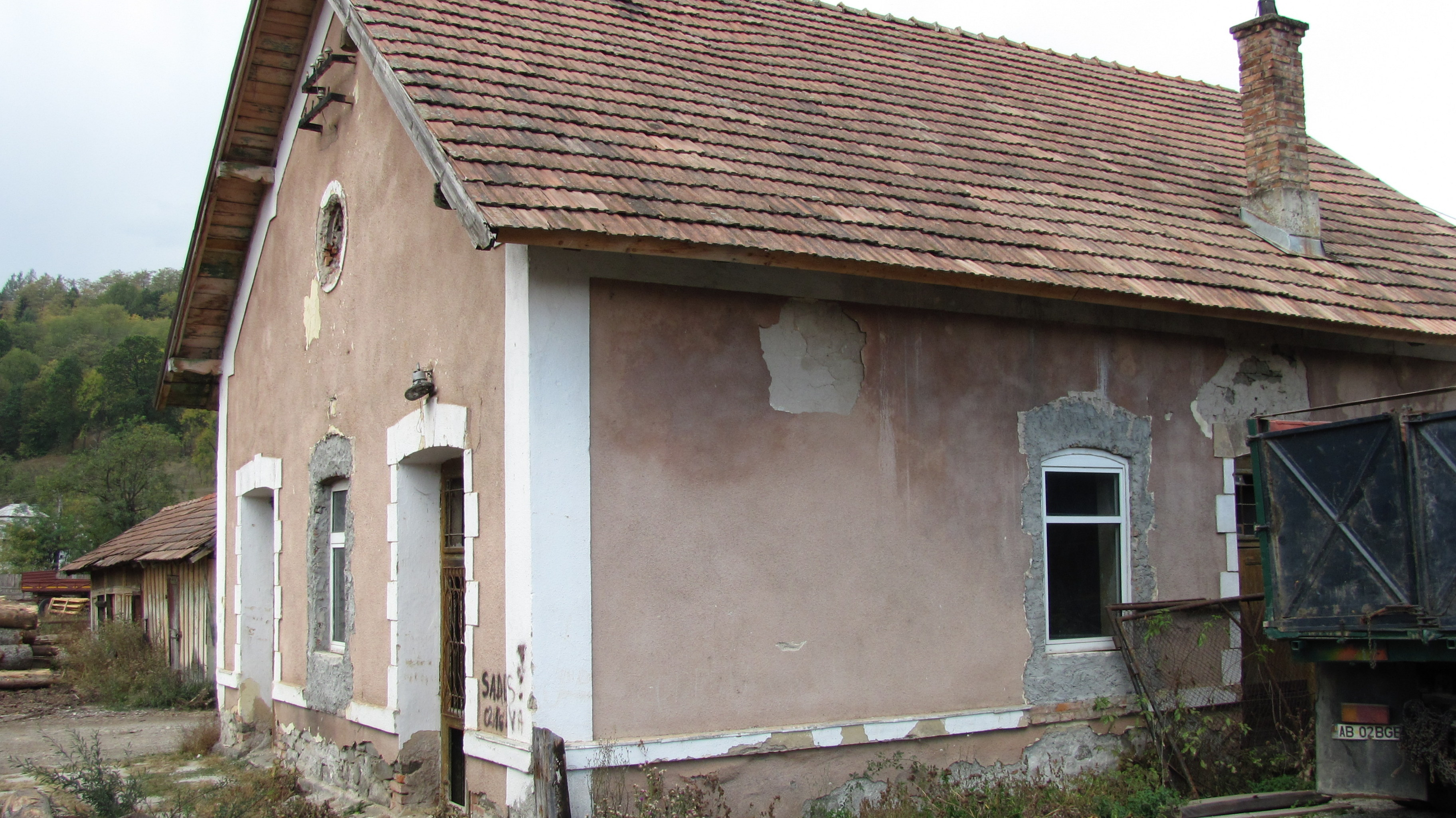 Bistra, Alba - Fosta haltă - Linie ingustă: Mocanița, tren personal si accelelerat 04